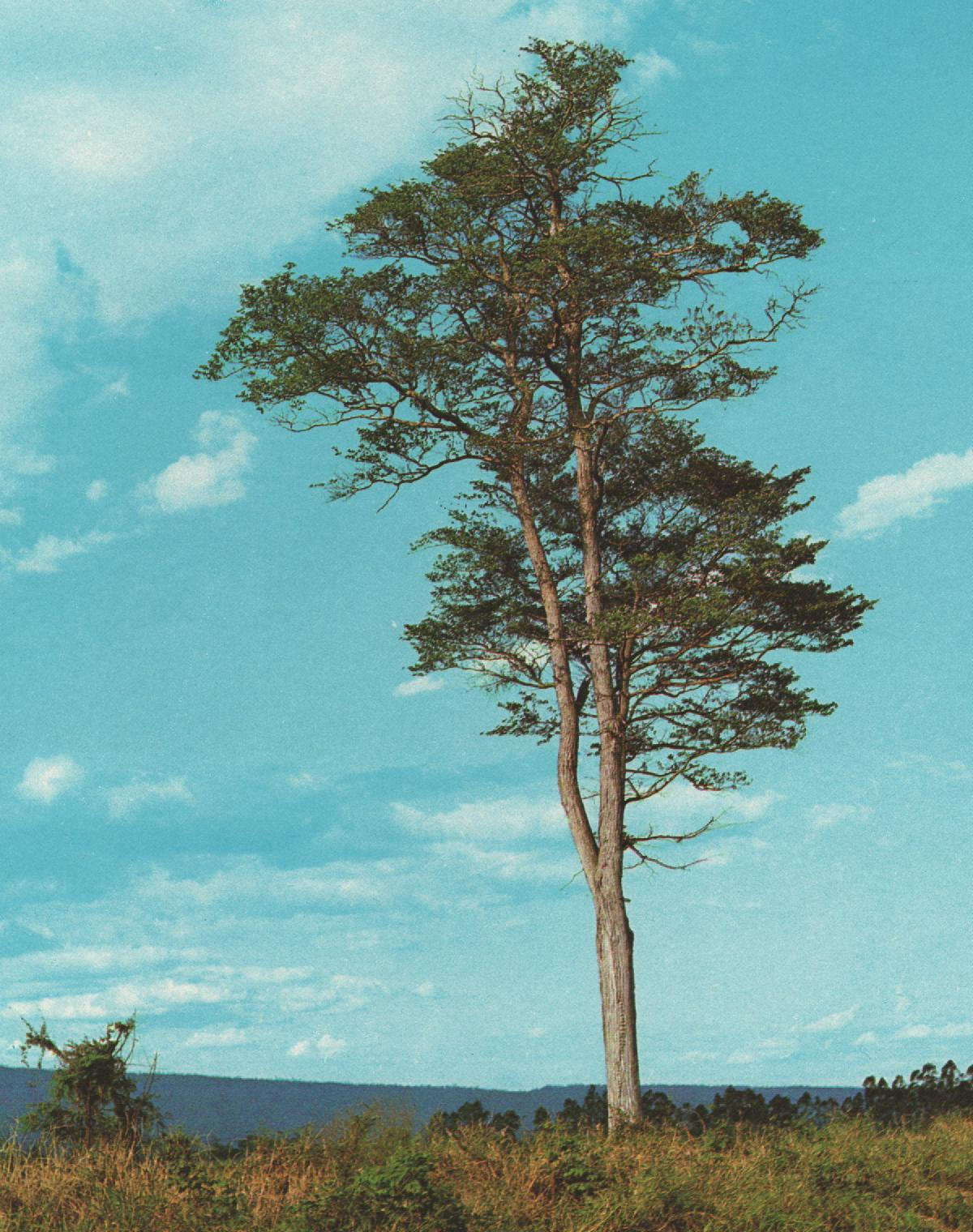 Ejemplar de Calycophyllum multiflorum en Argentina